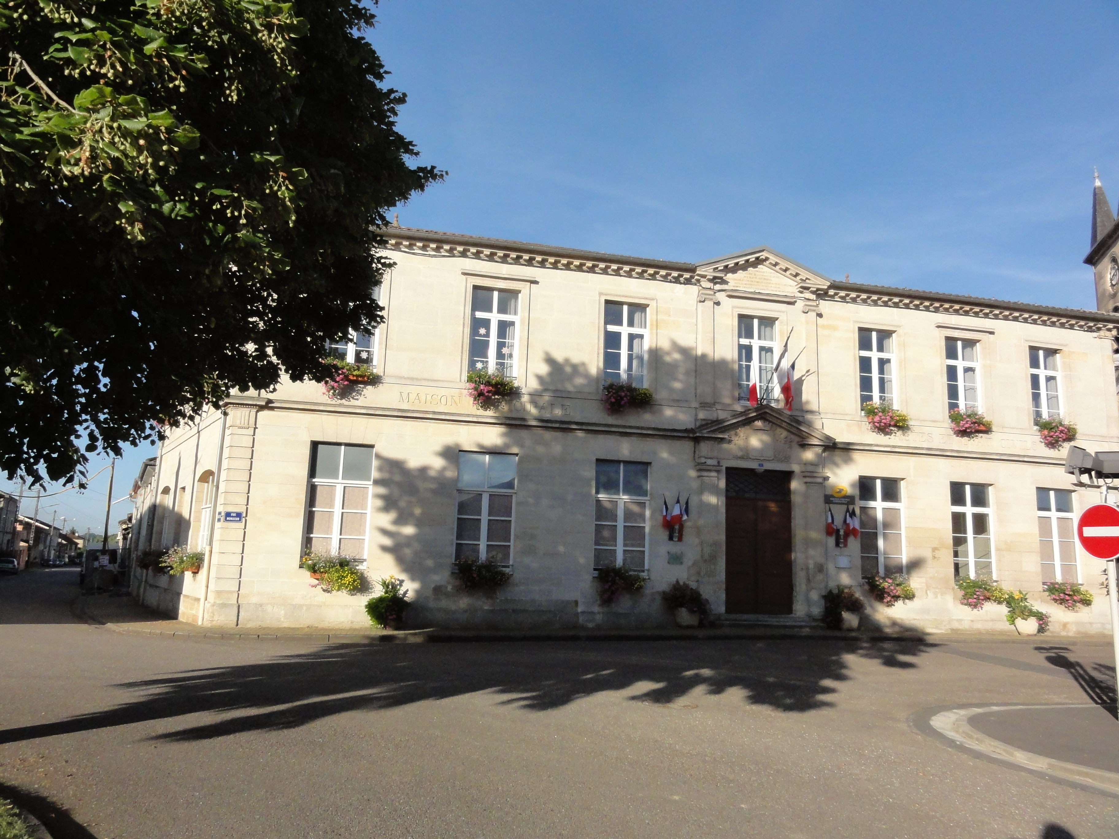 Brillon-en-Barrois (Meuse) mairie. Sur le fronton, un rare bas-relief des armoiries de la Monarchie de Juillet.